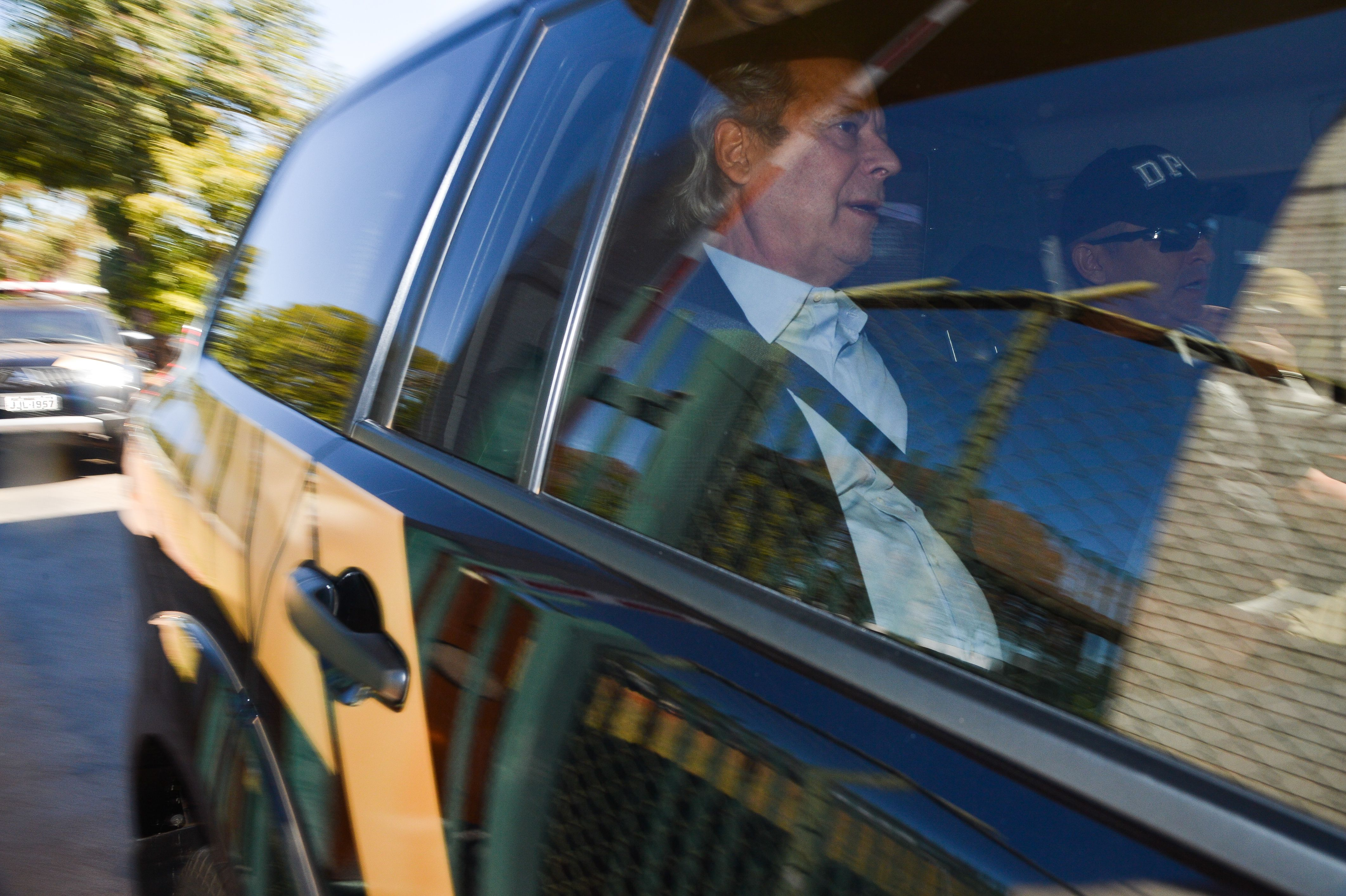 Translado do ex-ministro José Dirceu para Curitiba, após sua prisão na 17ª. fase da Operação Lava Jato.